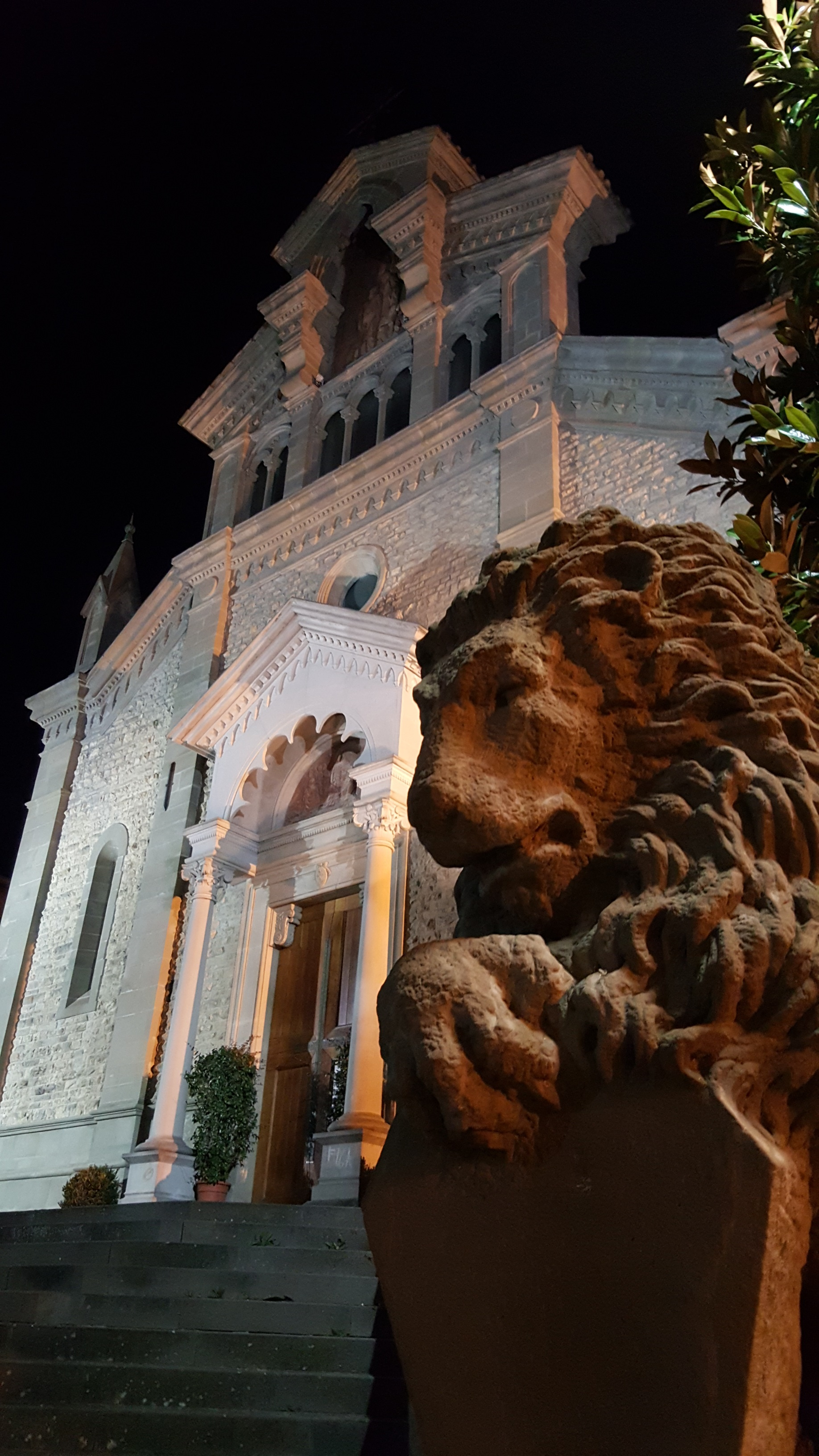 La Chiesa di San Piero in Bagno This is a photo of a monument which is part of cultural heritage of Italy.